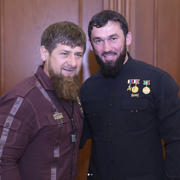 Глава Чеченской Республики, Герой России Рамзан Ахматович Кадыров вручает Председателю Парламента Чеченской Республики Магомеду Хожахмедовичу Даудову медаль «Защитнику Чеченской Республики» This file, which was originally posted to was reviewed on 1 June 2017 by the administrator or reviewer Daphne Lantier, who confirmed that it was available there under the stated license on that date.